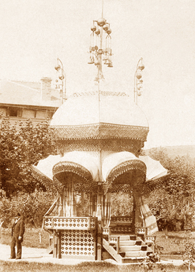 Quiosco para la visita de Alfonso XII a Comillas, de Antoni Gaudí (1881).